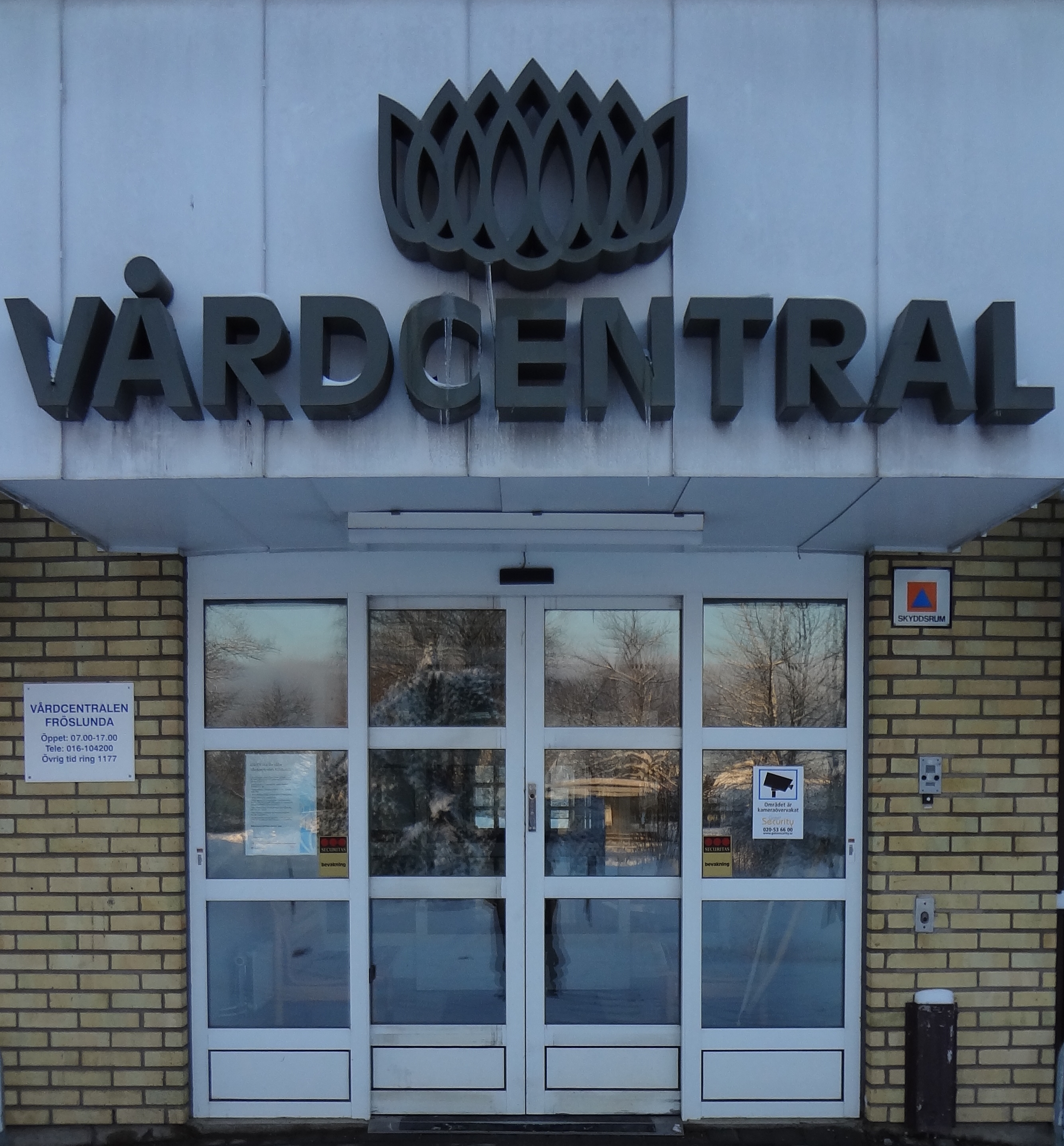 Ingången till Fröslunda vårdcentral i Eskilstuna med landstinget Sörmlands logotyp högst upp.